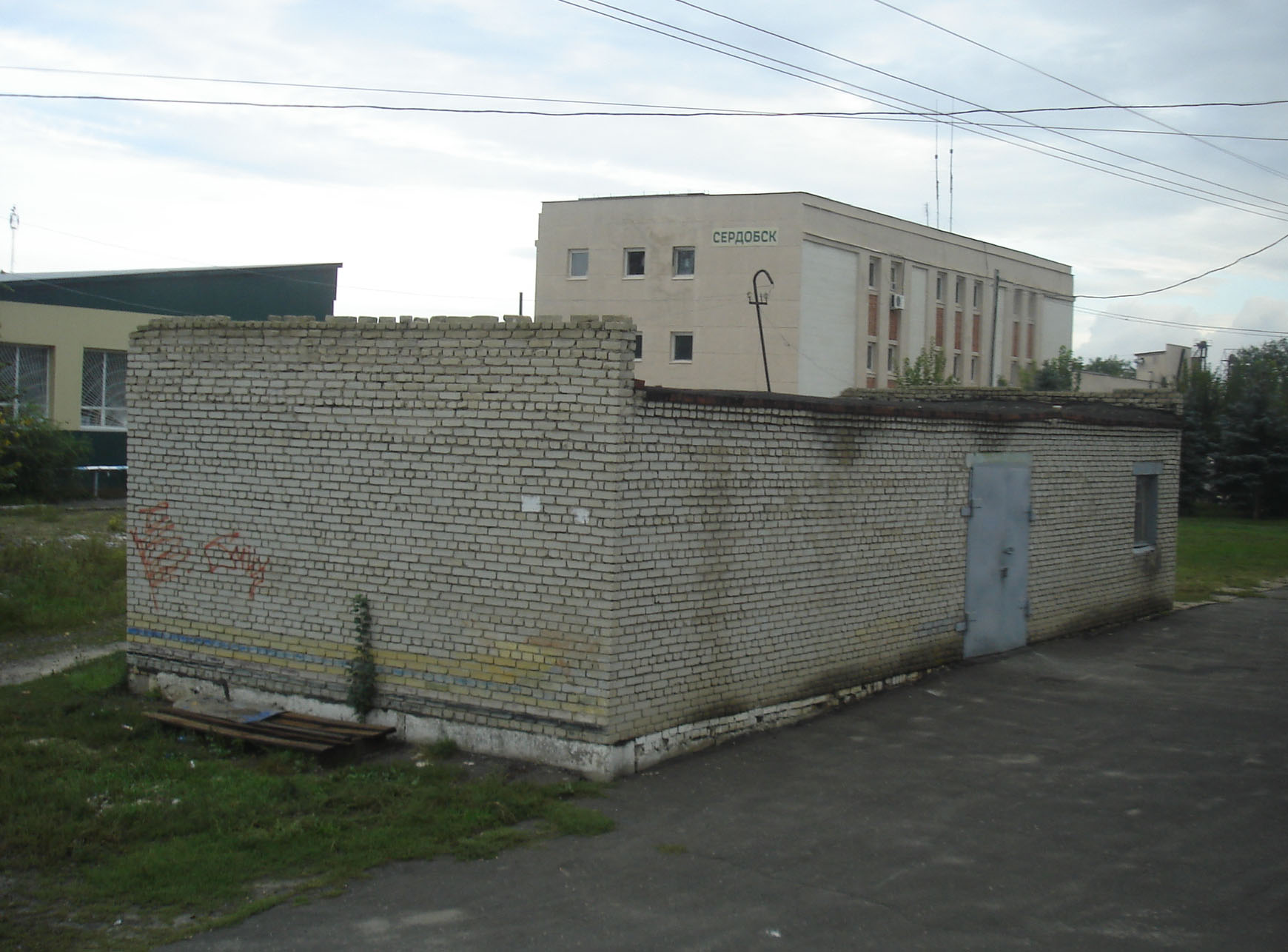 ЖД-станция Сердобск - здания на территории станции